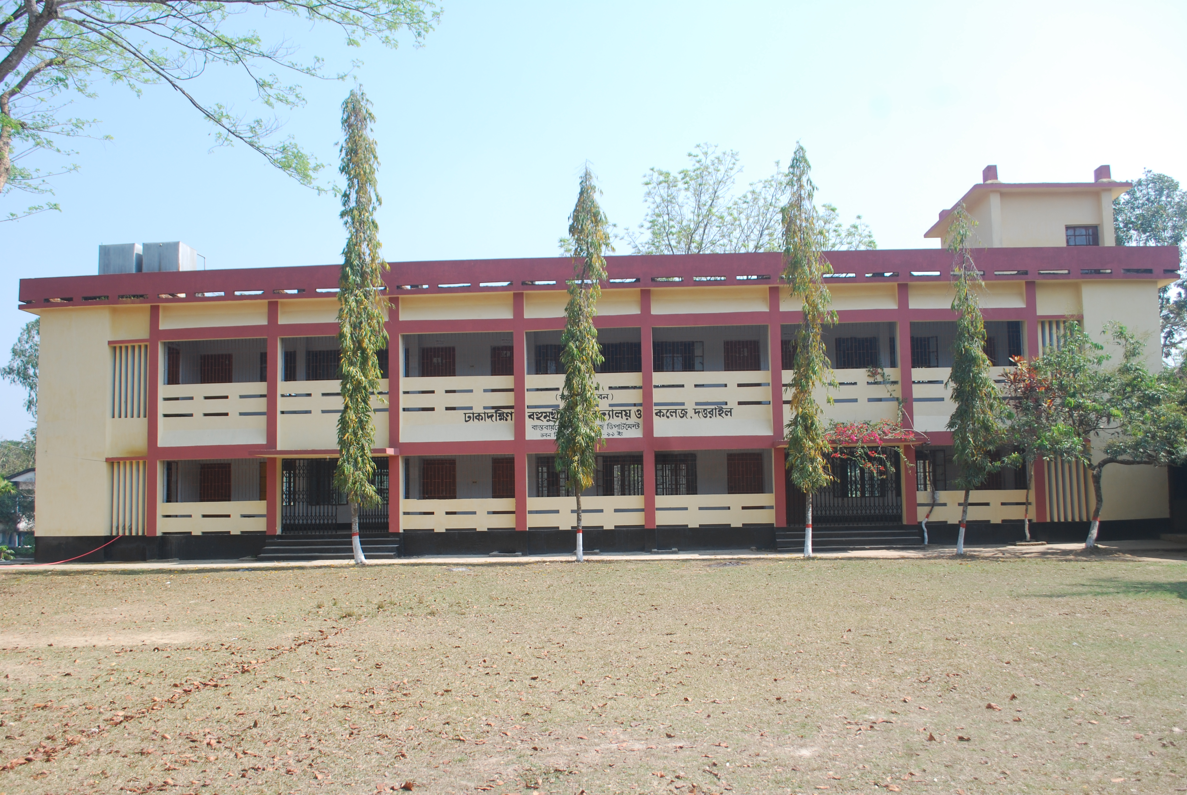 ঢাকাদক্ষিণ বহুমুখী উচ্চ বিদ্যালয়ের বহিঃচিত্র।